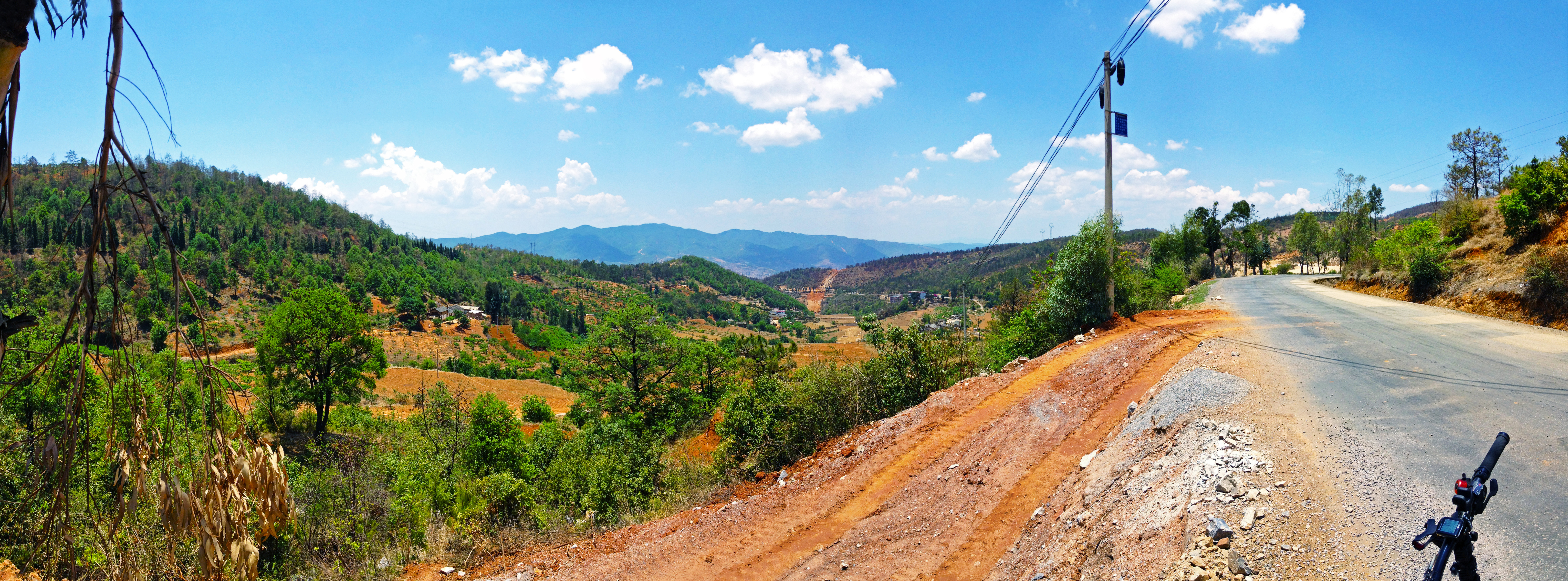 20130522云南G320国道安宁至禄丰坡道边群山1